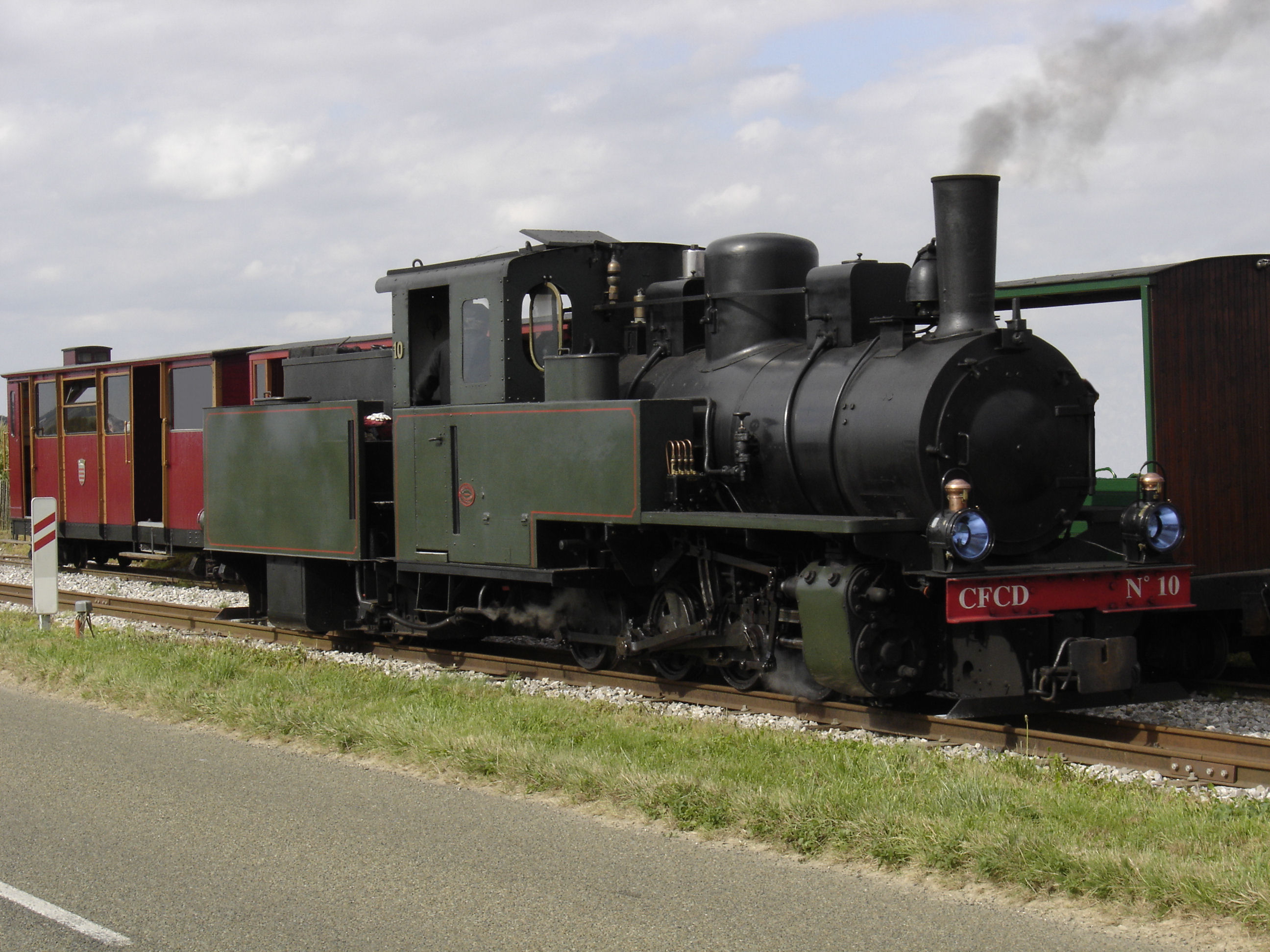 Locomotive construite par "Franco-Belge" à Raismes type 040 type KDL-11 (N° 2836 de 1945) de l'APPEVA (Chemin de fer Froissy-Dompierre).